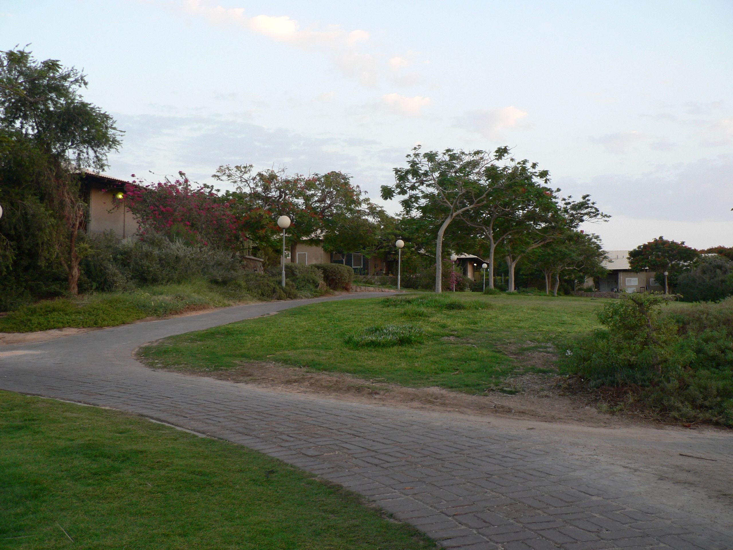 Yotvata, Israel קיבוץ יטבתה